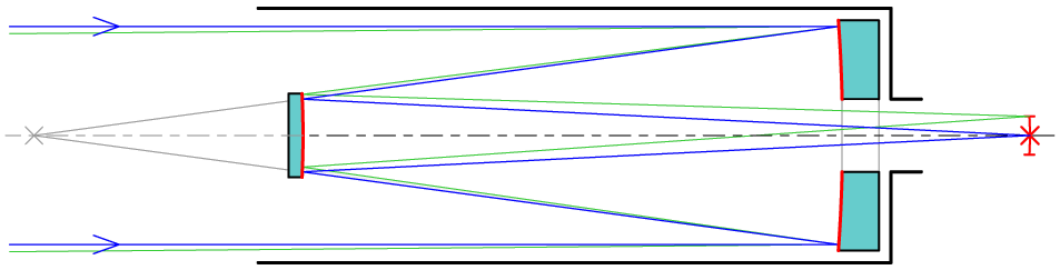 Strahlengang eines Cassegrain-Teleskops.